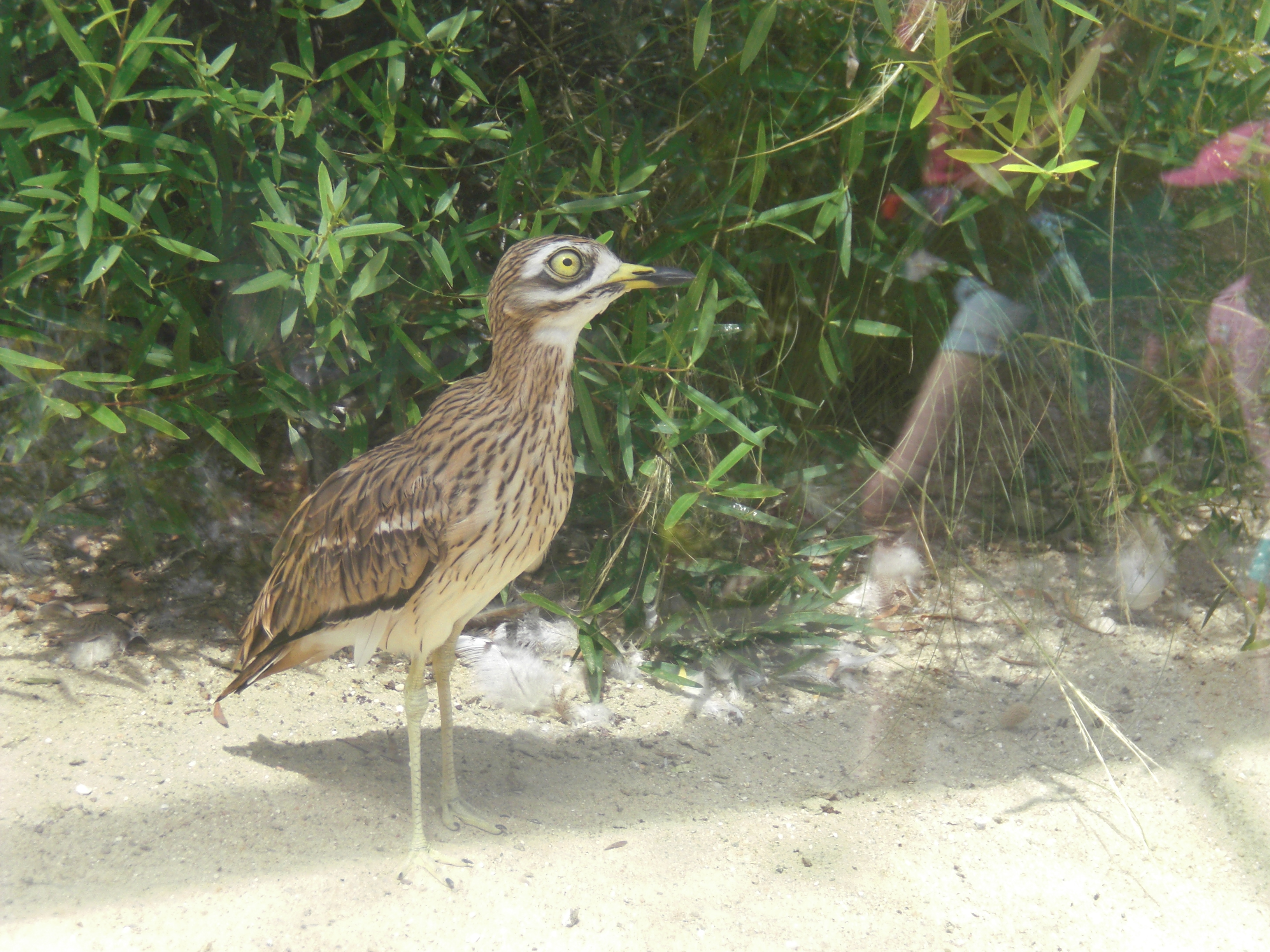 Trielo en bestogxardeno de Parizo.